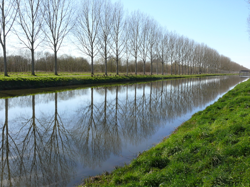 Le Canal de la Somme à "Petit-Port" (hameau au Sud de Port-le-Grand) - (Somme, Picardie, France)